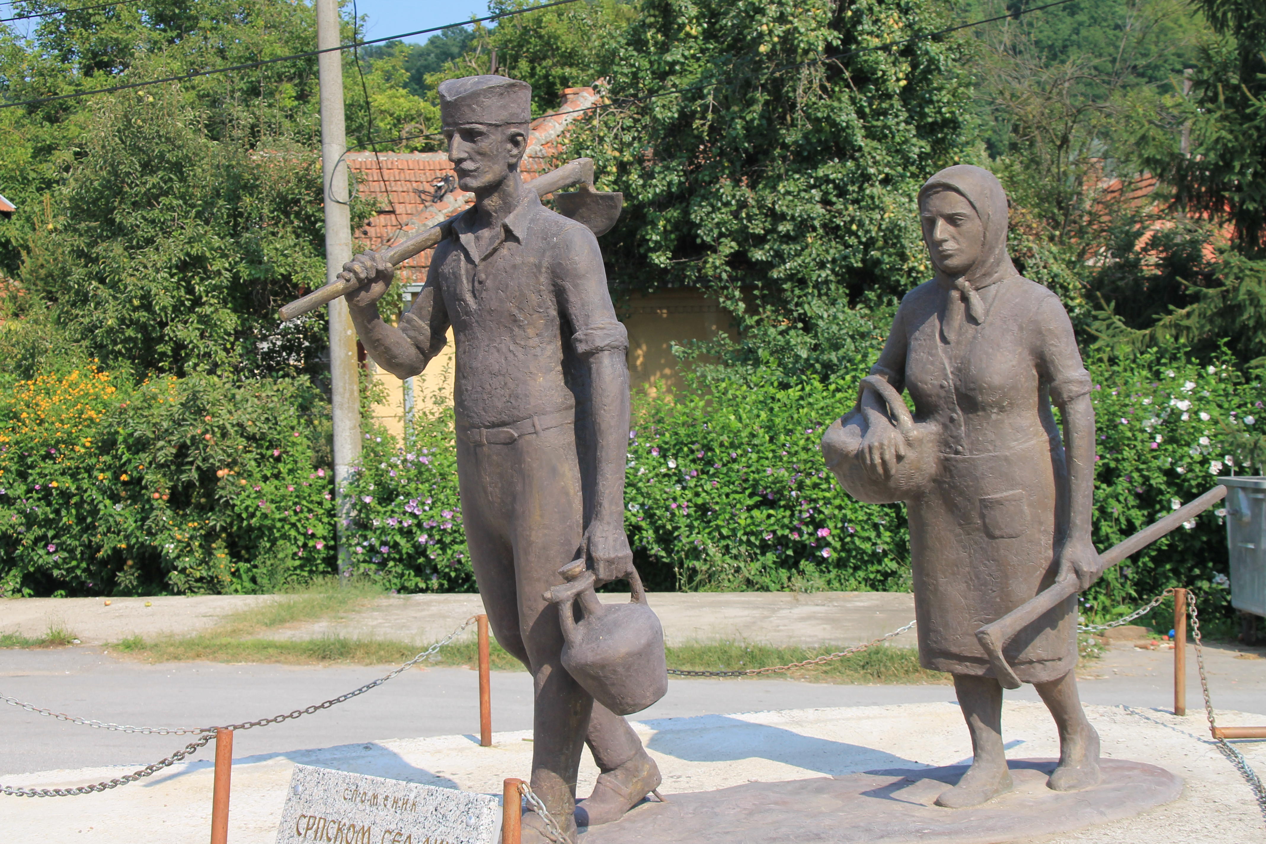 Spomenik srpskom seljaku